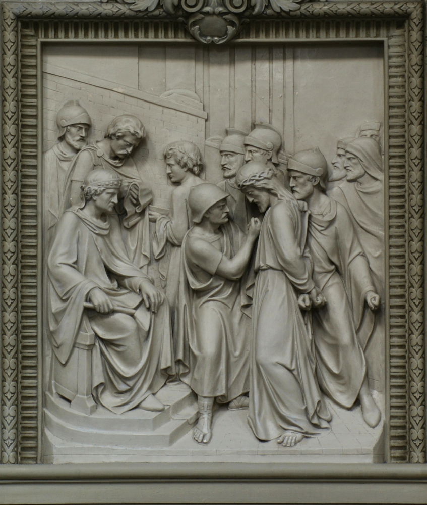 Eerste statie van een kruisweg, gemaakt door Jan Frans De Vriendt (Kerk van de H. Familie en St-Cornelius te Borgerhout)